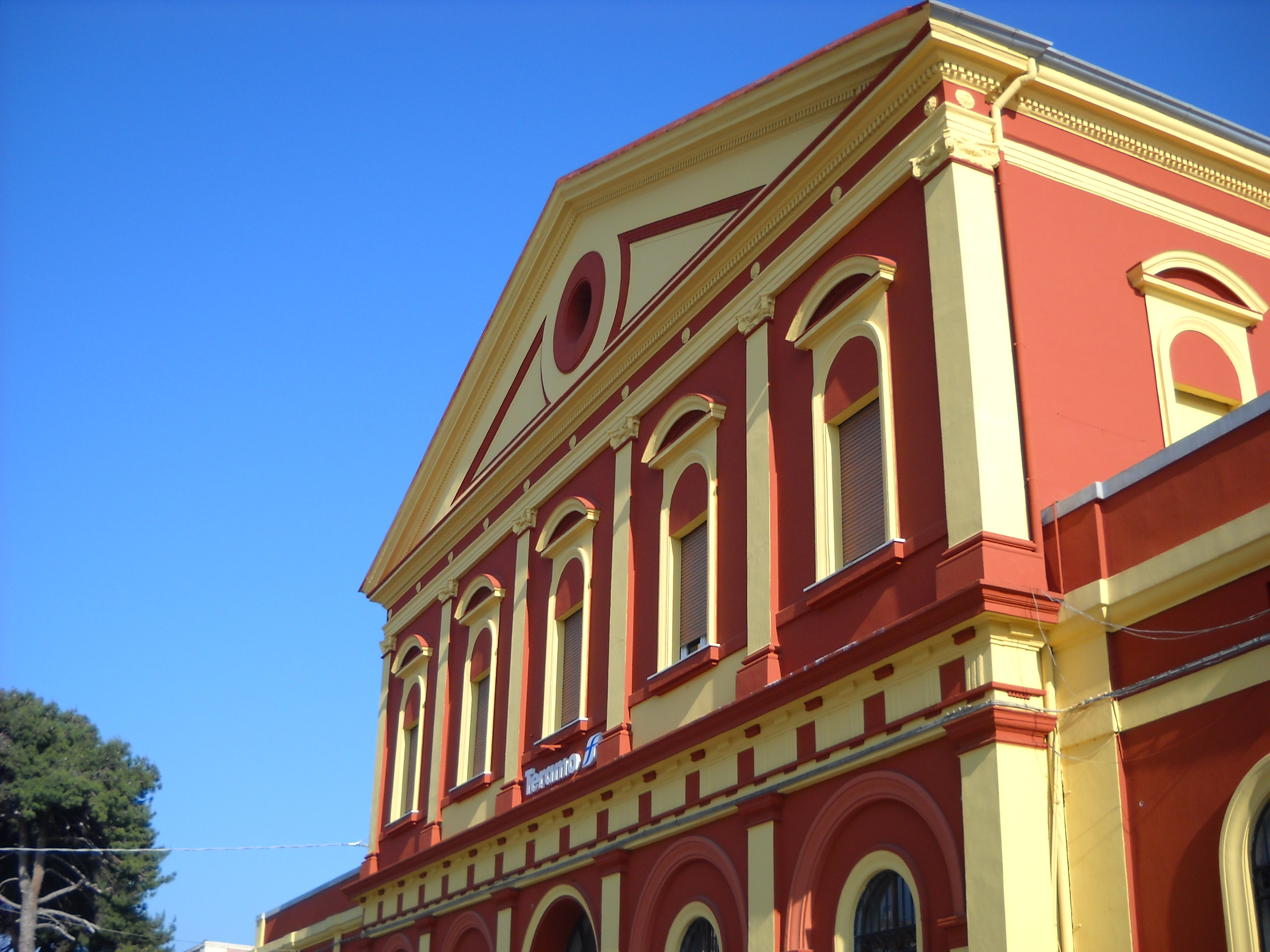 La facciata esterna della Stazione ferroviaria di Teramo Licenza